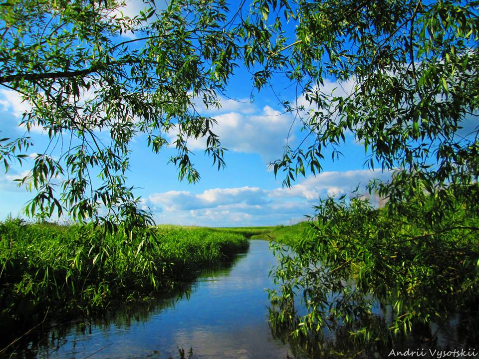 Річка Горпинка